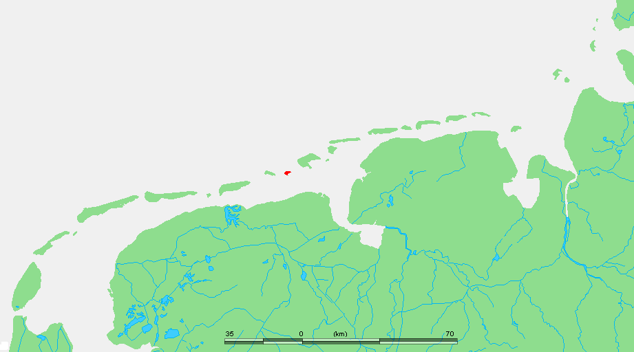 Wadden - Rottumeroog.PNG